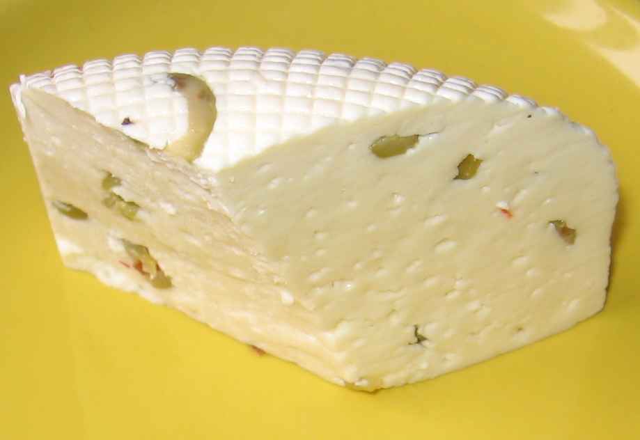 kawałek sera korycińskiego (z oliwkami i papryką)